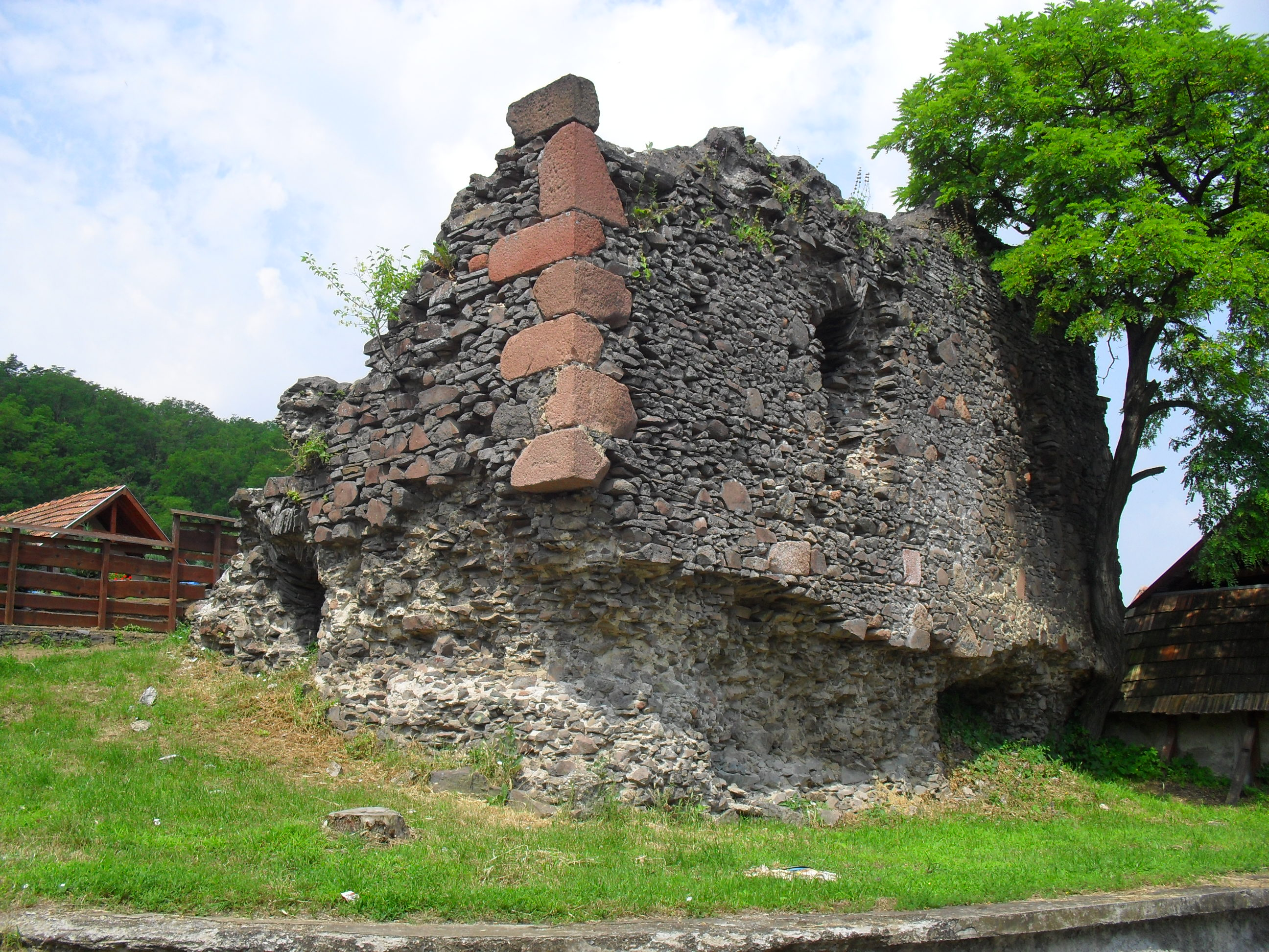 Királyhelmec - Csonkavár